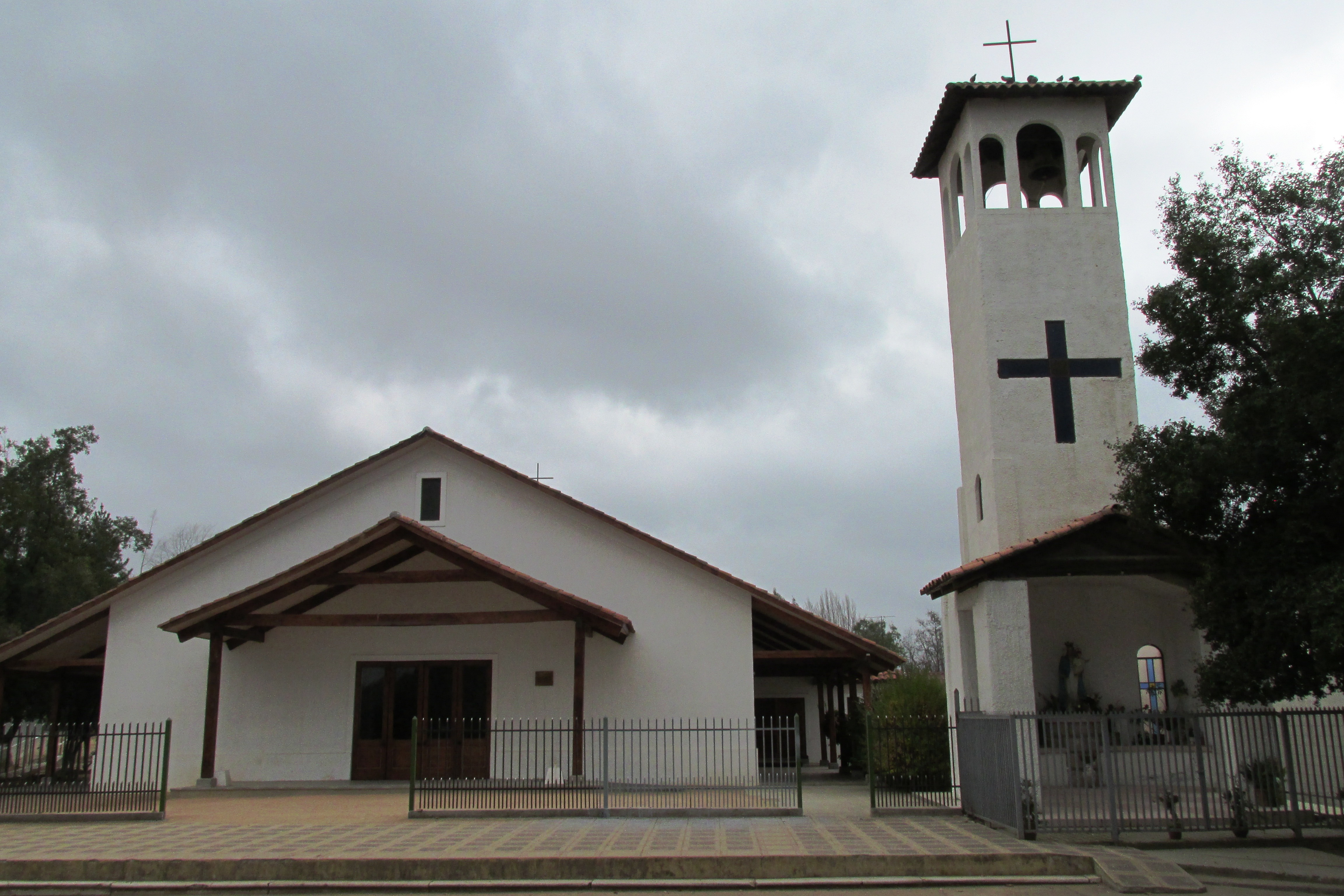 Frontis Parroquia Nuestra Señora del Rosario Litueche, reconstruida y restaurada el 07 de Octubre del 2012